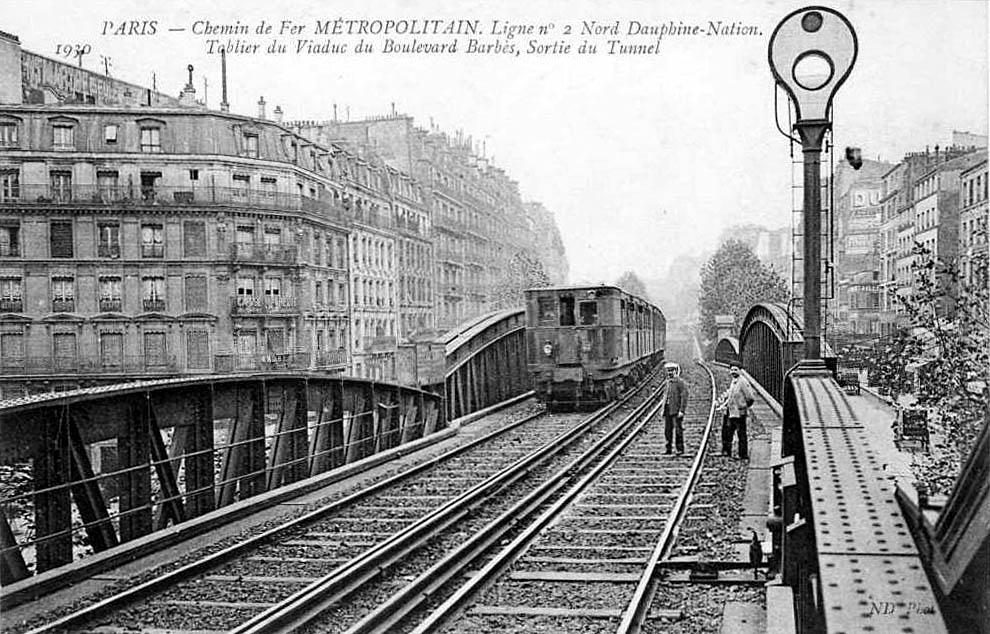 Paris - Chemin de fer métropolitain - Ligne 2 Nord Dauphine-Nation - Tablier du viaduc du boulevard Barbès, sortie du tunnel.